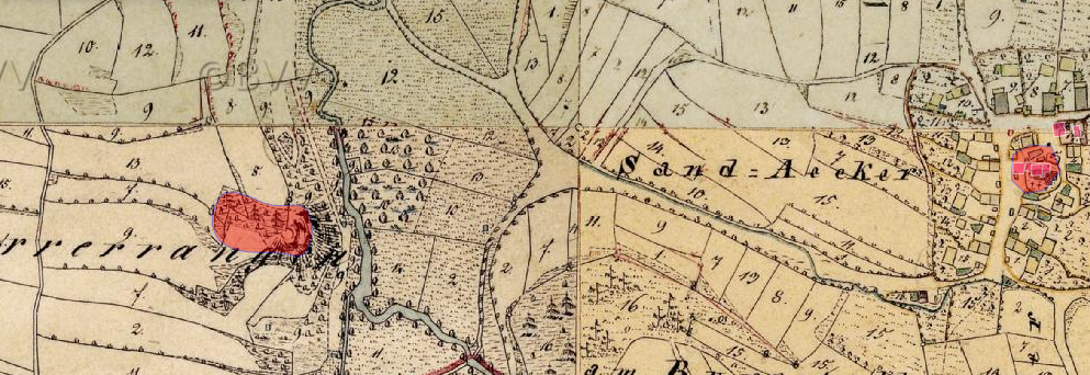 Bodendenkmäler im Bereich des Ortes Gunzendorf (Oberfpfalz)